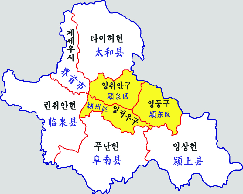 푸양시 현급구역